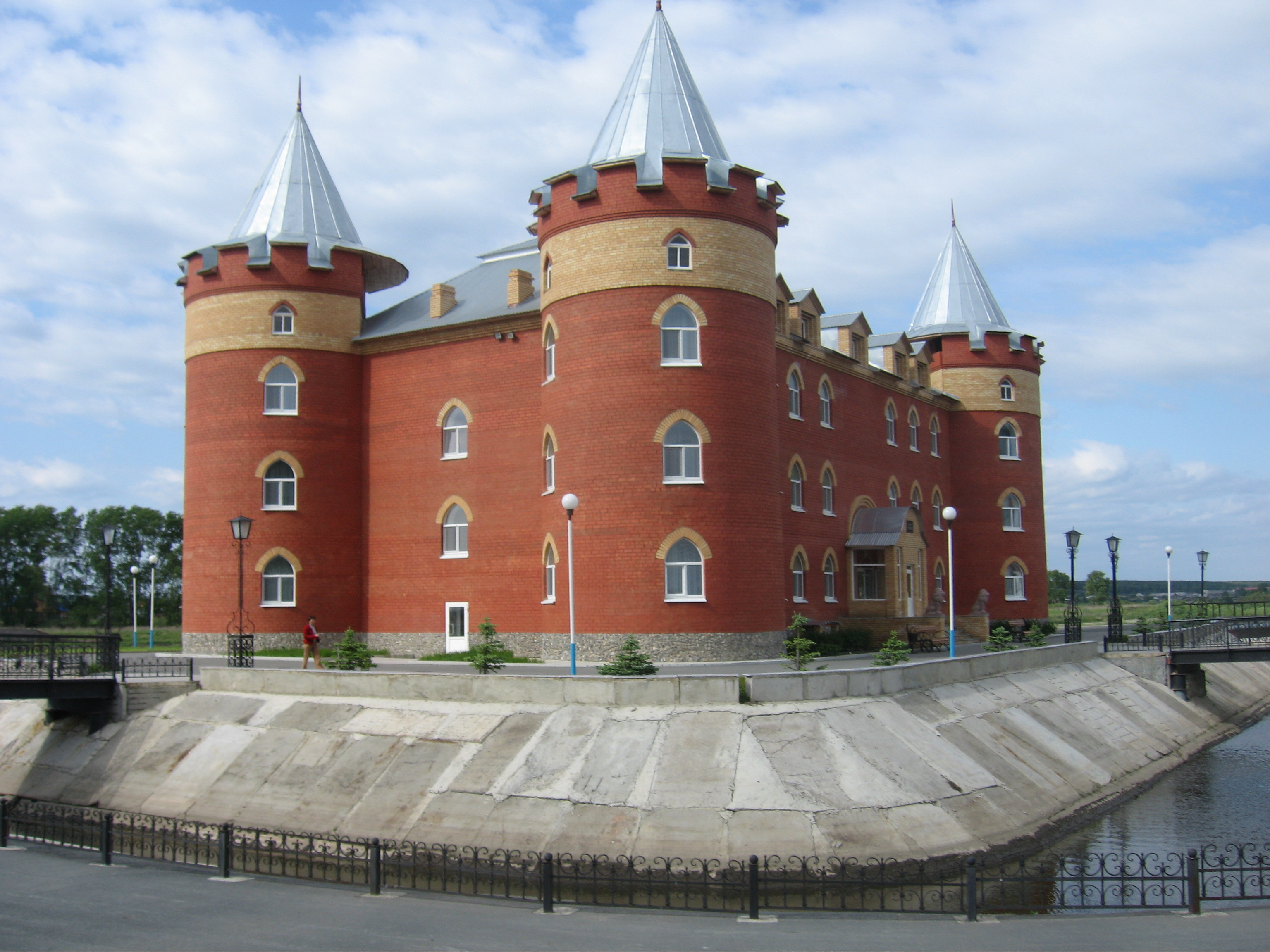 Санаторный корпус в Обухово